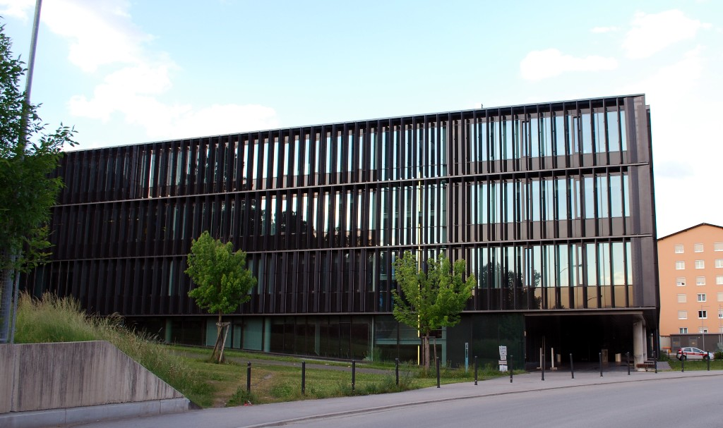 Eduard-Wallnöfer-Zentrum der UMIT in Hall in Tirol, Westfront. Eduard-Wallnöfer-Center of the private university UMIT in Hall in Tirol, western front.